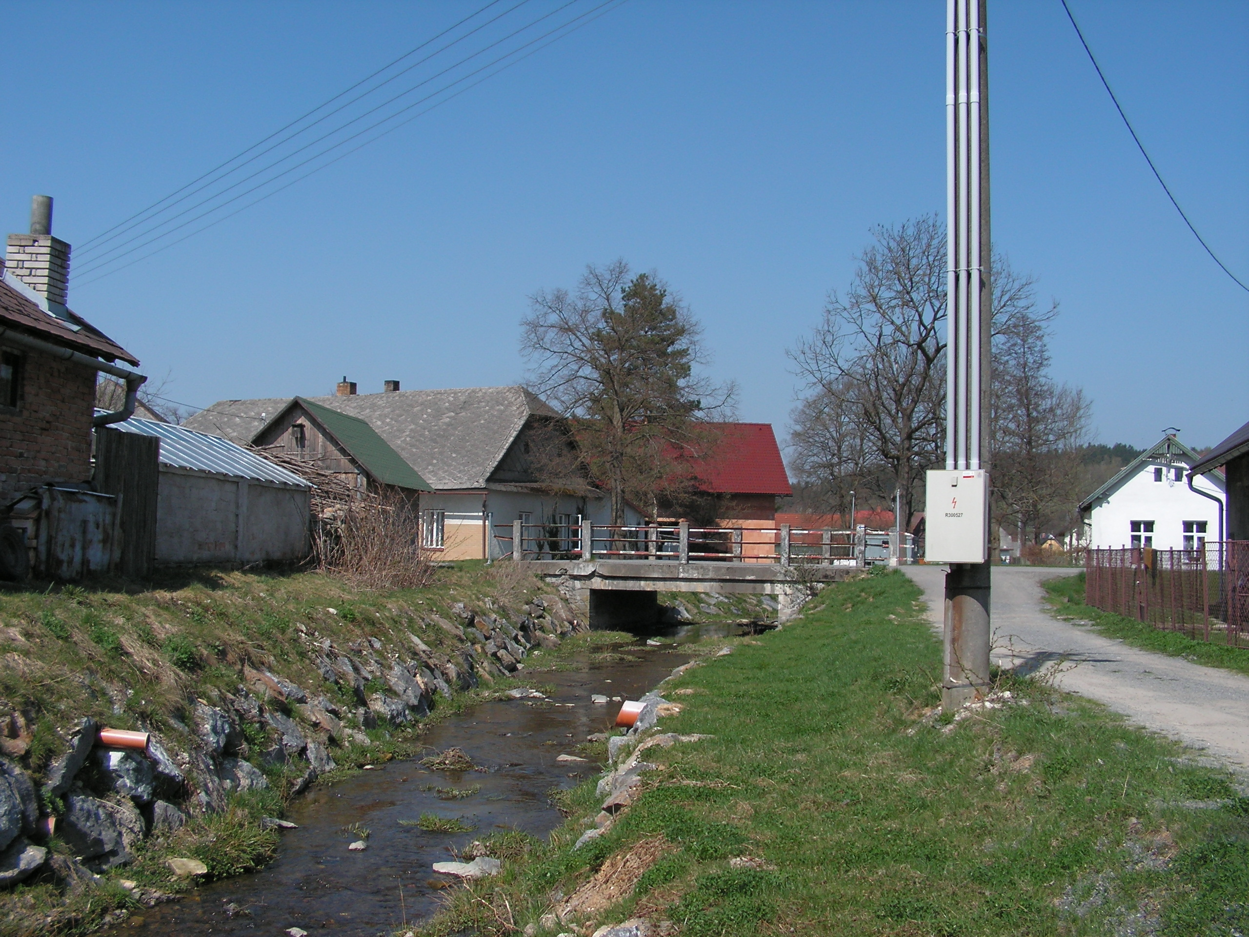 Městecký potok ve Vojnově Městci v okrese Žďár nad Sázavou